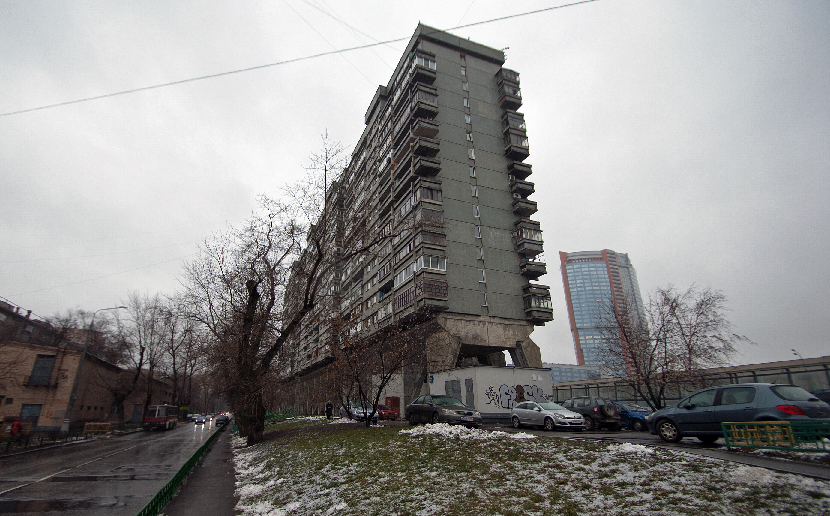 Москва, Беговая 34 - Тринадцатиэтажный трёхподъездный панельный жилой дом серии «Лебедь».